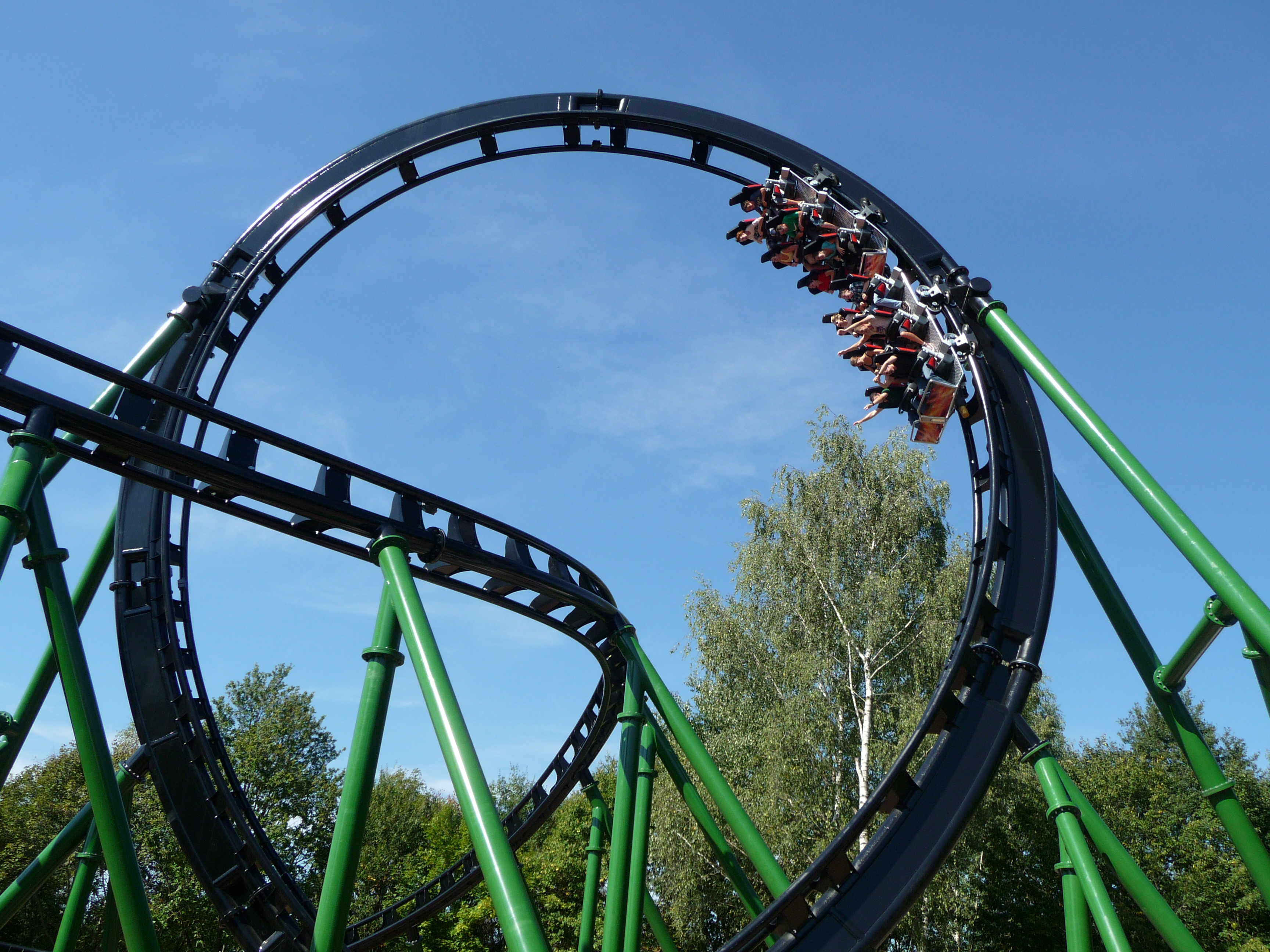 Achterbahn Freischütz Bayernpark